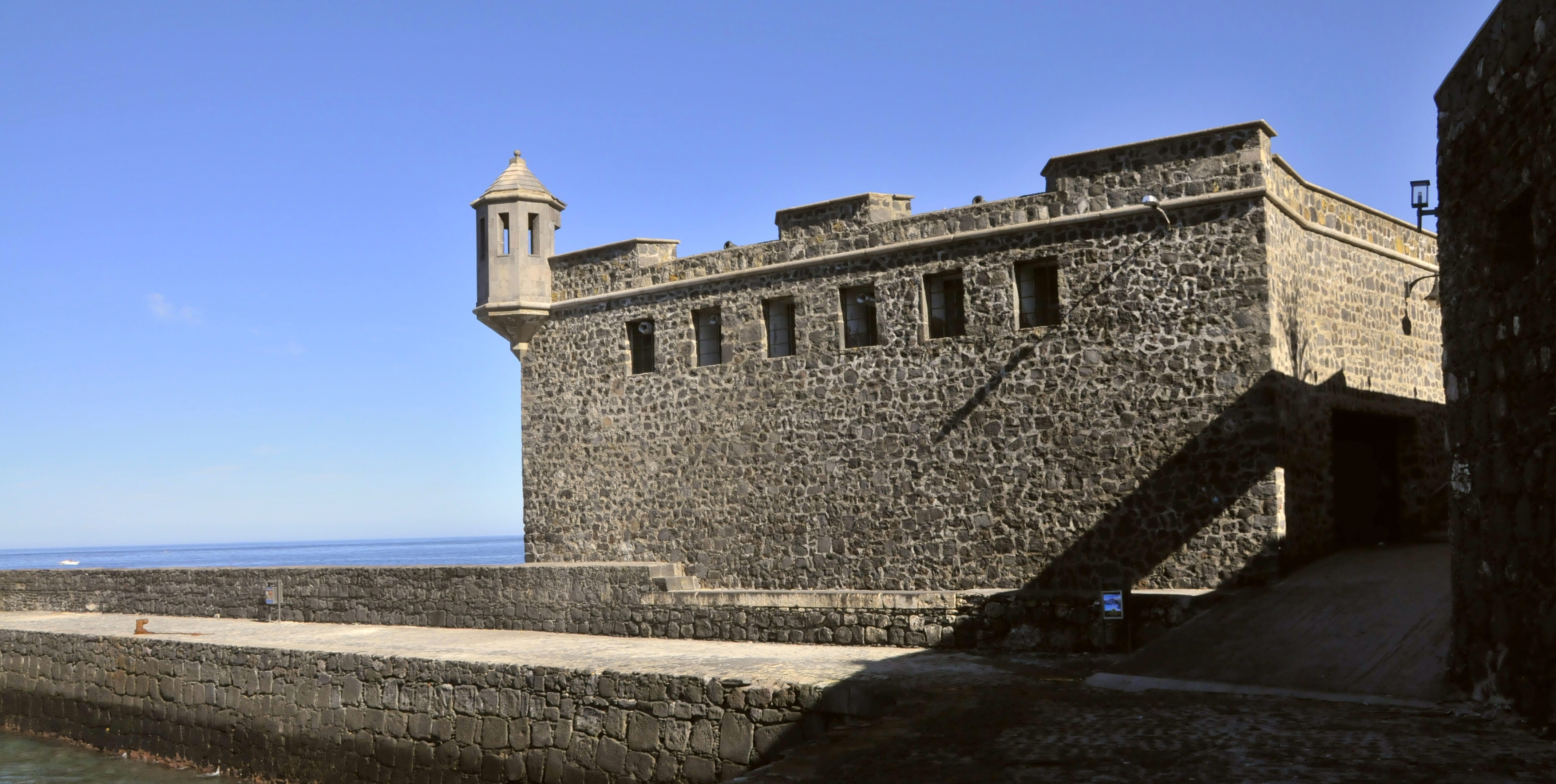 Puerto de la Cruz, Bateria de Sanata Barbara